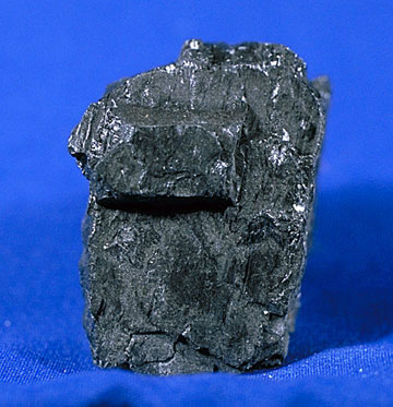 coal